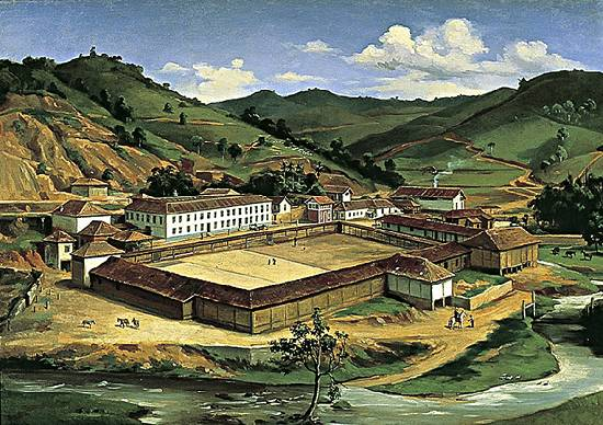 Benedito Calixto - Fazenda de Café - Vale do Paraíba. Óleo sobre tela de 70x102 cm integra o catálogo do Museu Paulista